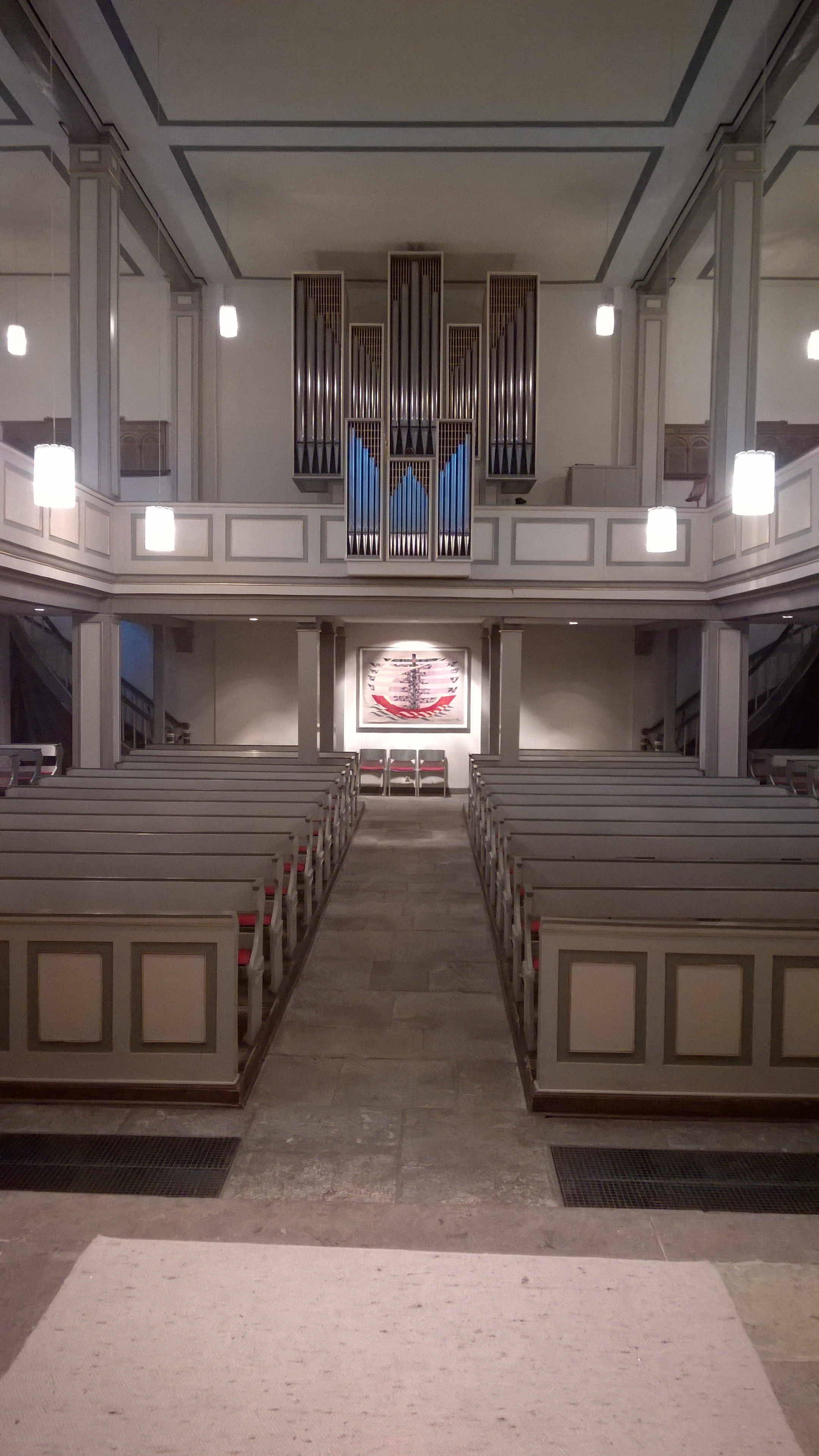 Alte Kirche Bönen, Innenraum, Blick zur Orgelempore